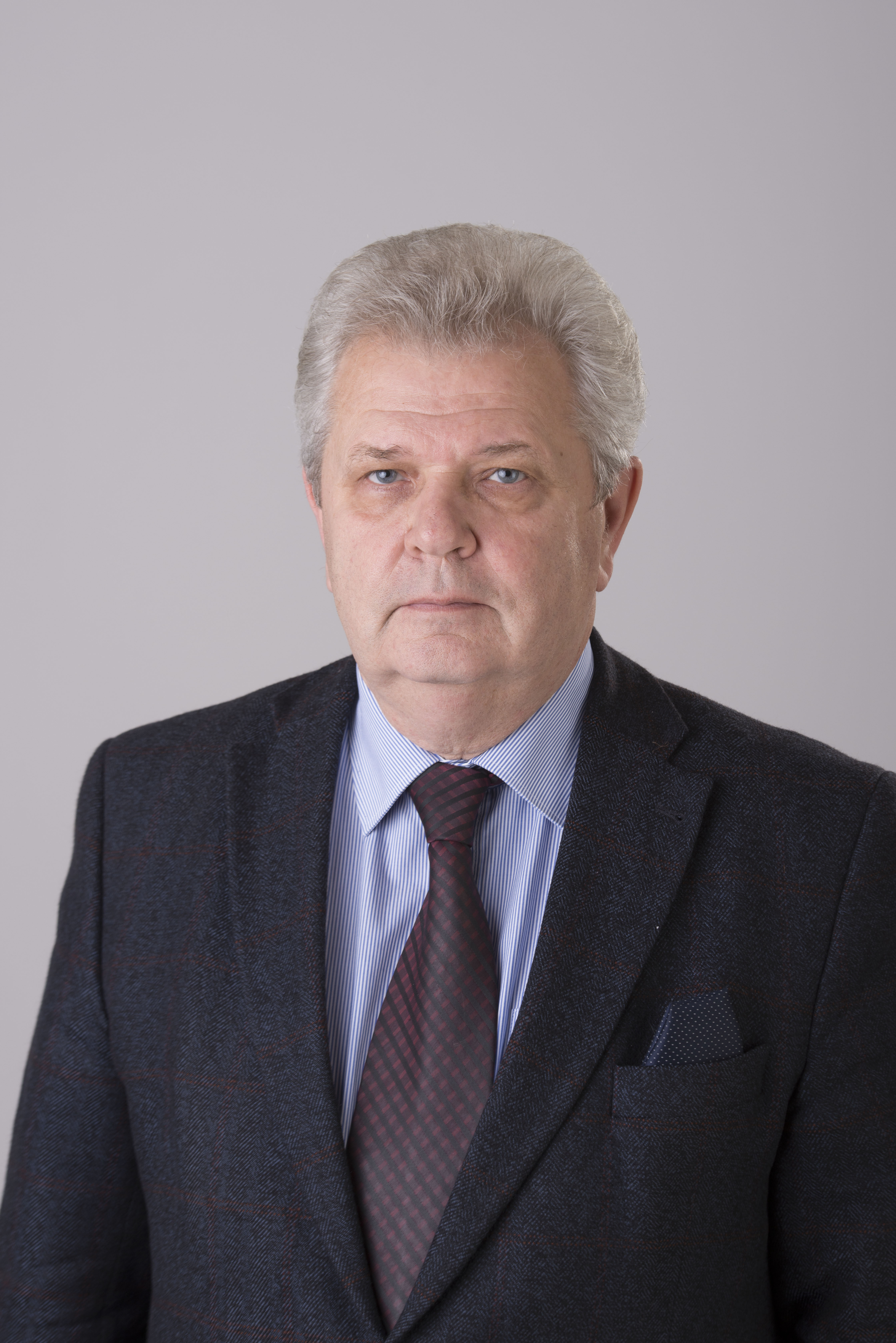 2014.gada 9.decembris. 12.Saeimas deputāts Andris Bērziņš. Foto: Reinis Inkēns, Saeimas Kanceleja Izmantošanas noteikumi: saeima.lv/lv/autortiesibas